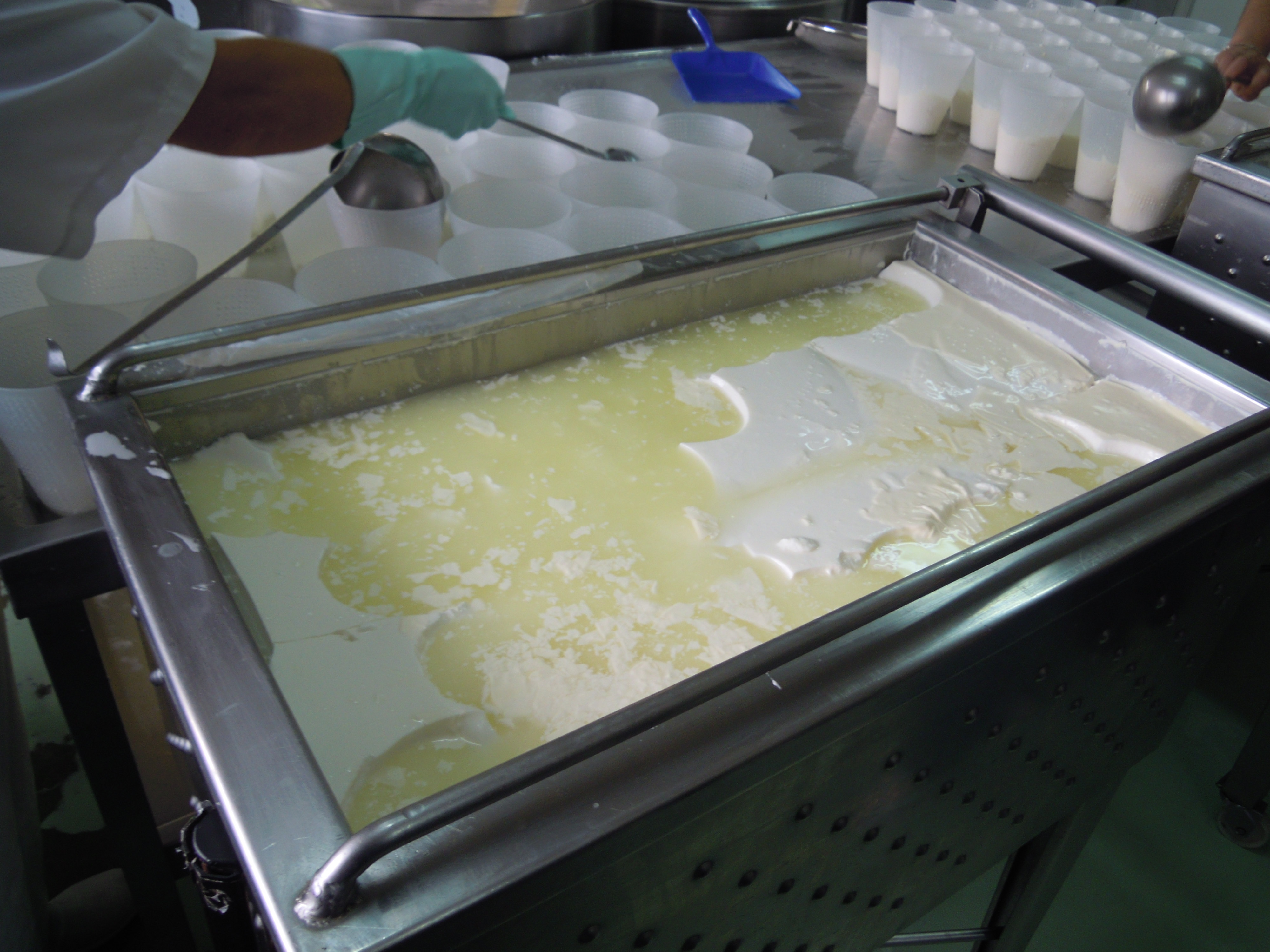 Tarreña cola cuayada